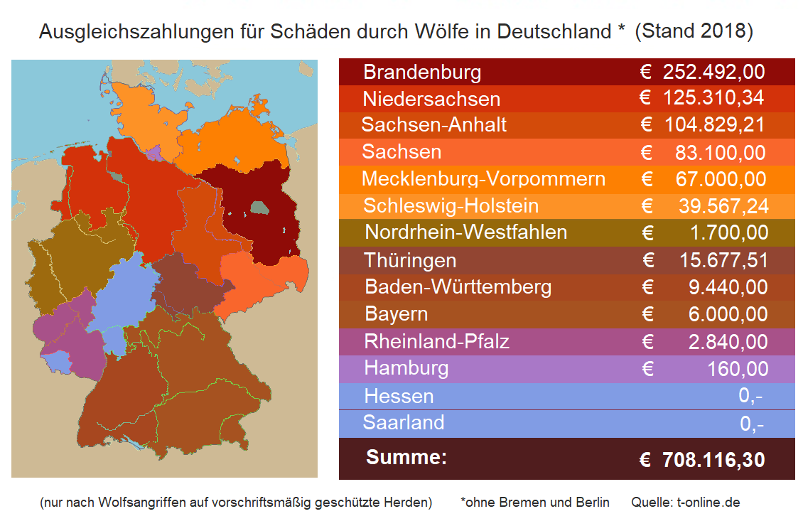 Eigene Neuzeichnung der Grafik im Bericht von Sarah Orlos und Jonas Mueller-Töwe [1]